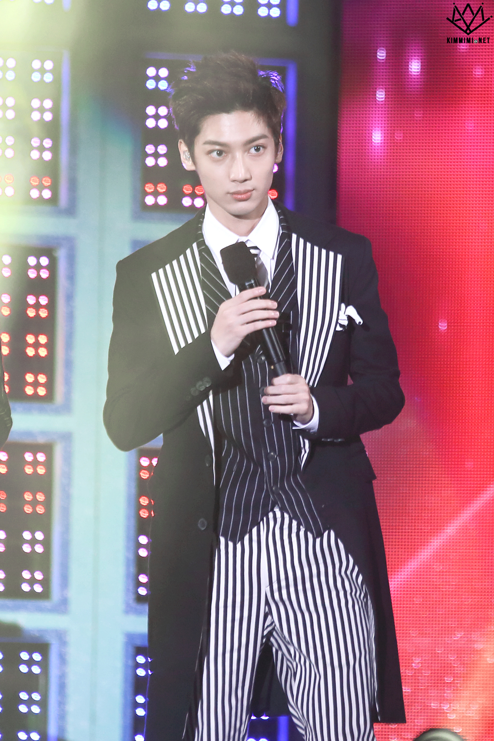 150516 보이프렌드 양산웅상회야제